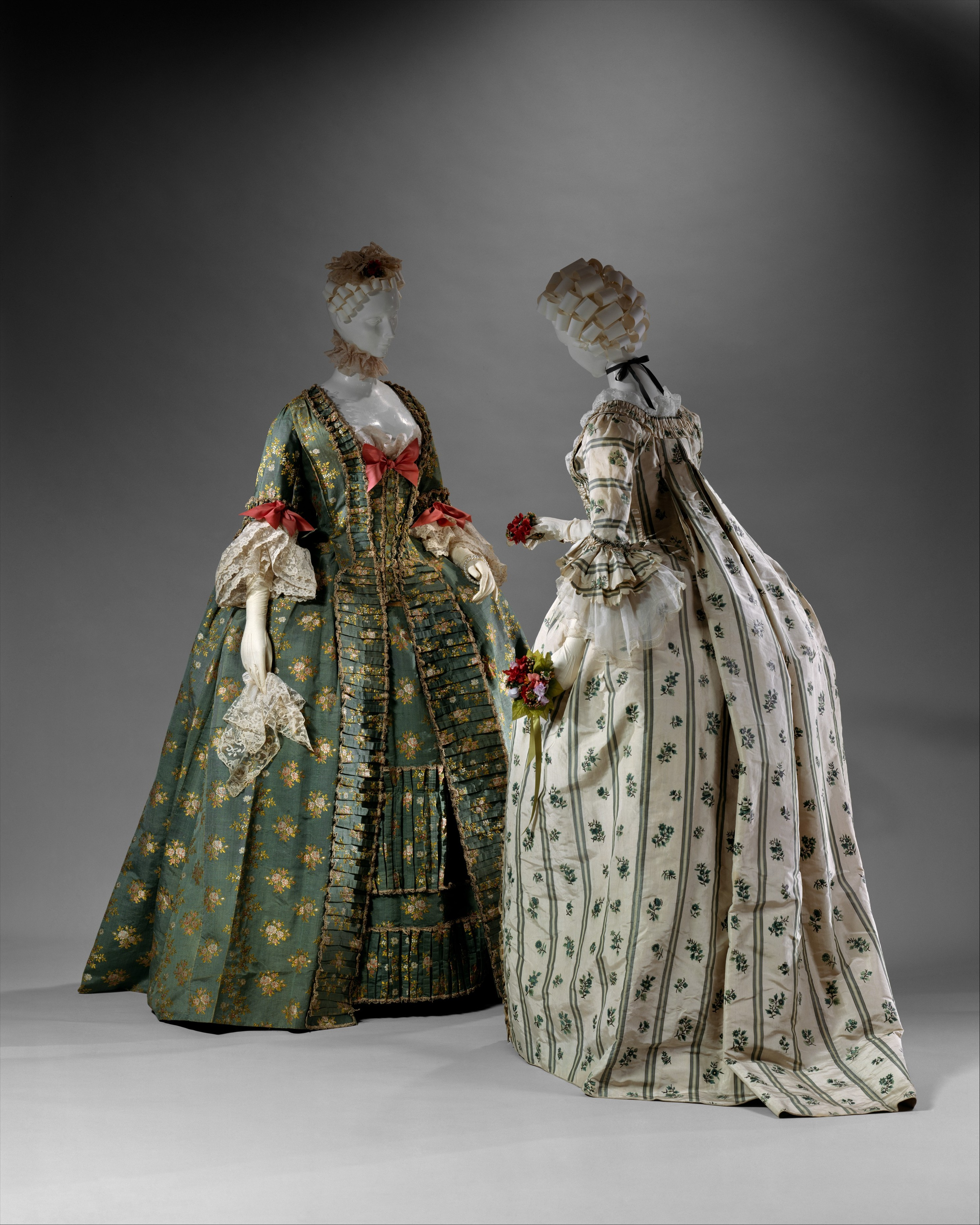 French; Robe à la Française